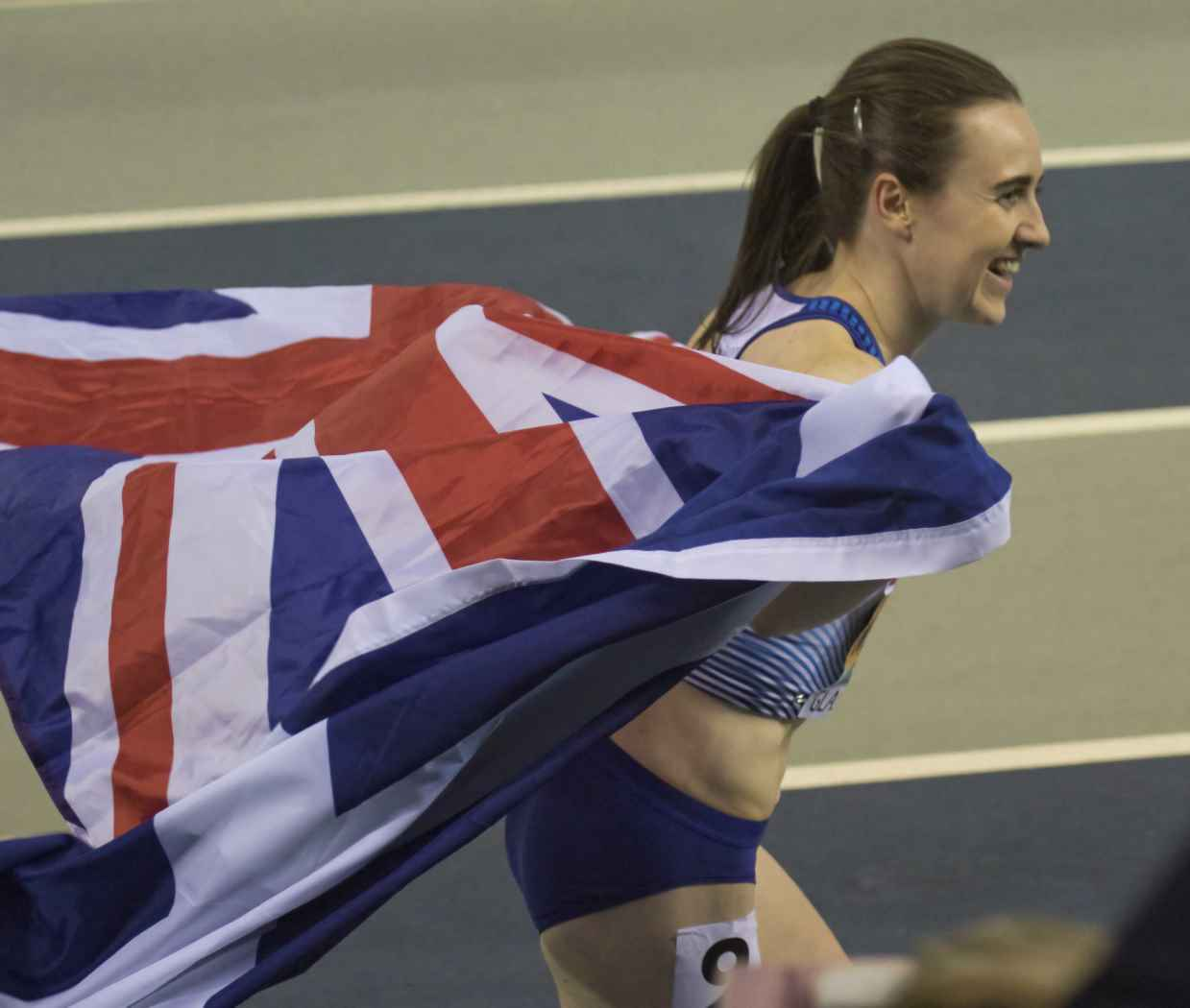 EKI30559 1500m dames muir